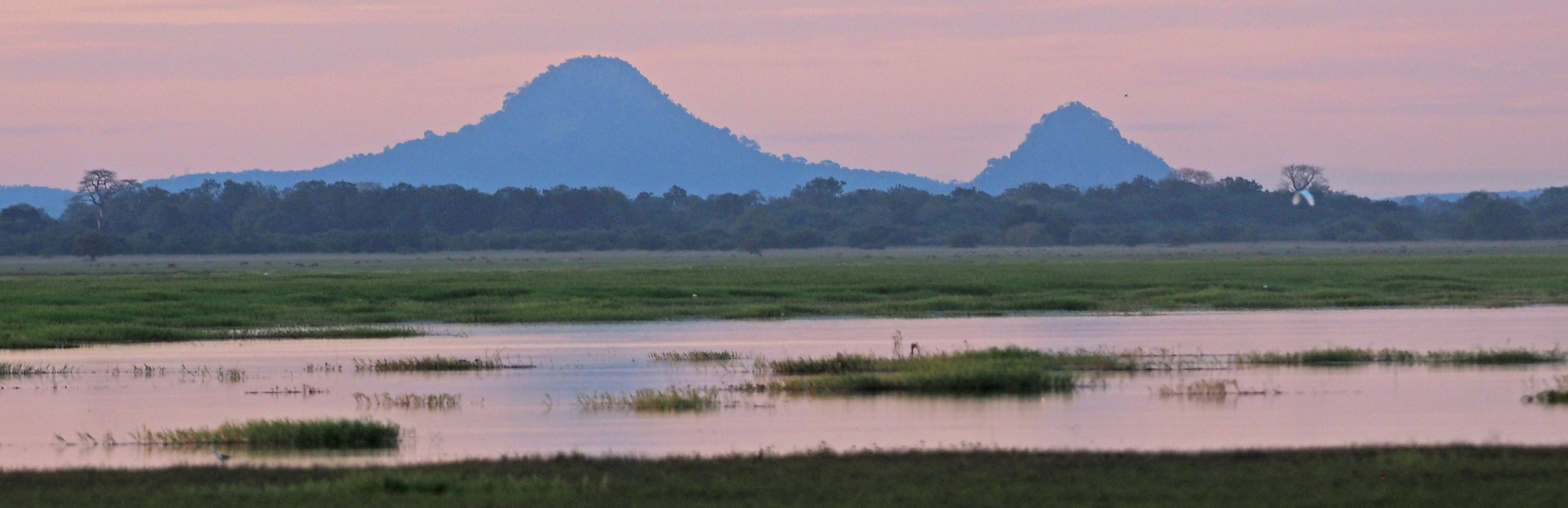 Mount Gorongosa, Gorongosa National Park, Mozambique